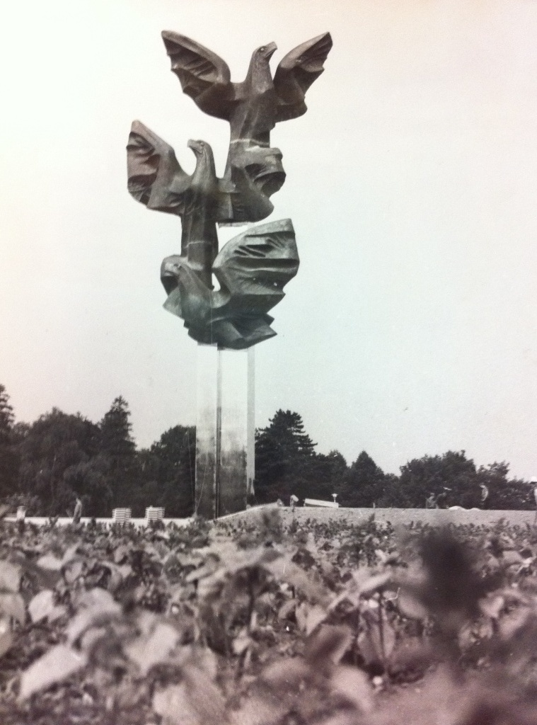 Pomnik Czynu Polaków. Kronika II Liceum Ogólnokształcącego w Szczecinie